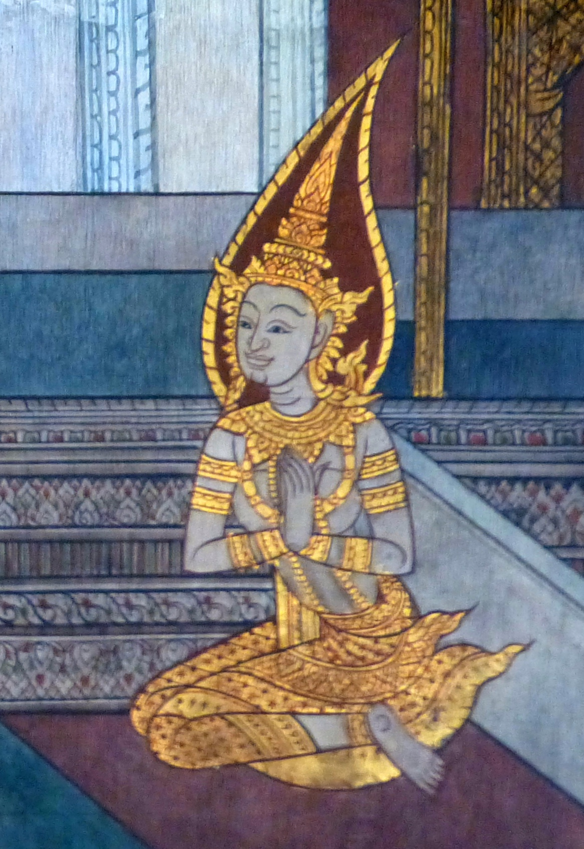 Wat Pho, Bangkok